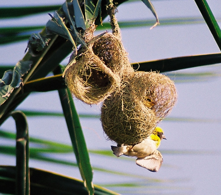 A Baya Male Displaying, See Female in the nest, Picture Taken at Kotaballappalli, Karnataka, India.